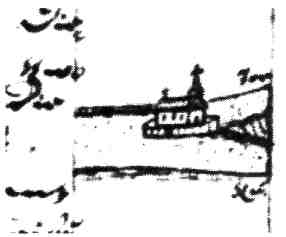 Давня дерев'яна церква святої Анни у Львові.